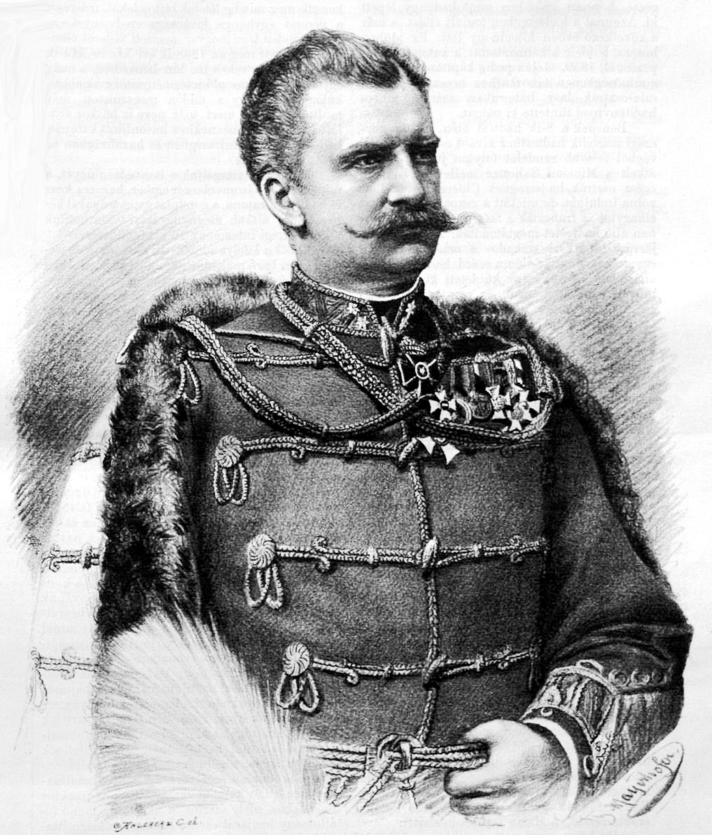 báró Fejérváry Géza (1833–1914) katonatiszt, politikus, miniszter, miniszterelnök portréja. Koller Károly fényképfelvétele (1884)